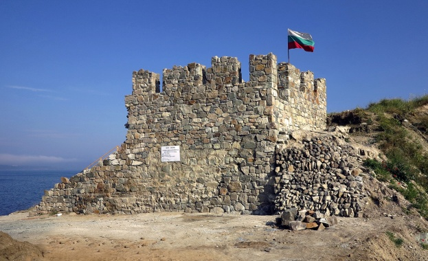 Късноантична крепост при нос " Акин " в северозападната част на полуостров " Свети Никола "